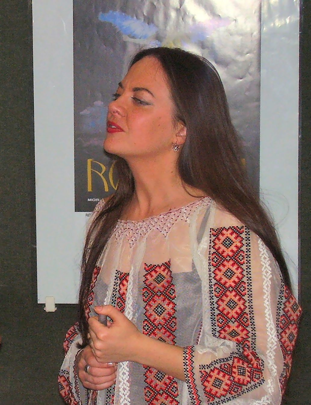 Roksana Vikaluk